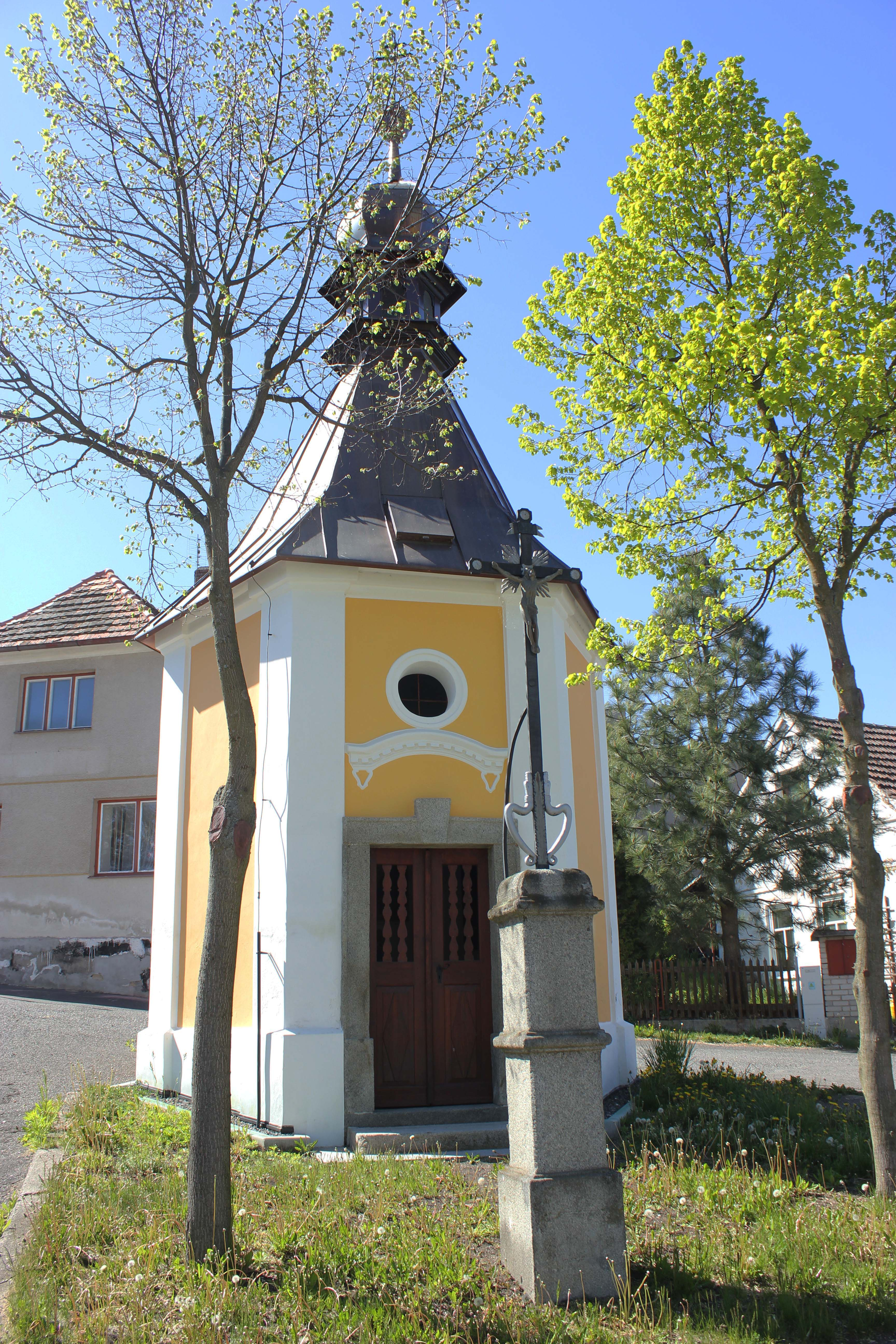 Kaplička v Bezděkově pod Třemšínem